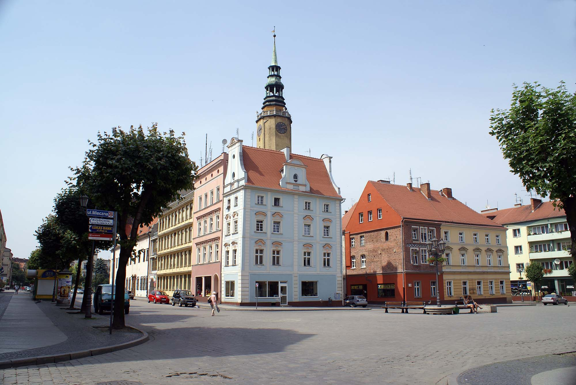 Brzeg, Stare Miasto